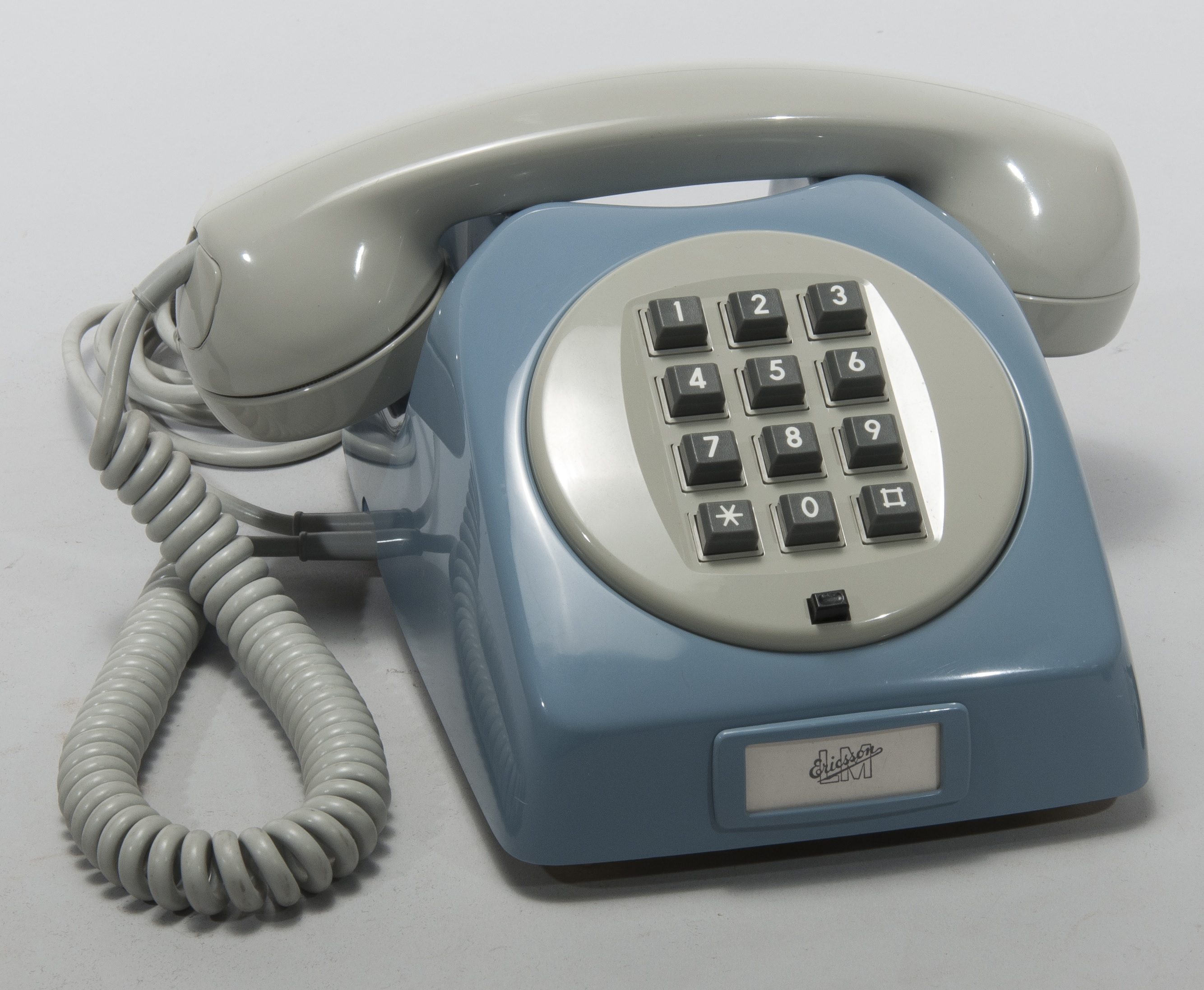 Telefonapparat Dialog för AT-system, huvudapparat, anknytningsapparat till växel och sidoapparat. Bordsmodell med kåpa av blå termoplast, knappsats med 12 knappar för tonval och apparatsnöre anslutet till propp. Ringsignalens styrka är ställbar med ett reglage på apparatens undersida. Dialog började tillverkas 1962 och blev Televerkets standardtelefon i mars 1969. Formgivarna från arkitektkontoret Ahlgren-Olsson-Silow (AOS) var starkt influerade av amerikanen Henry Dreyfuss ergonomistudier. I takt med att plasten gjorde sitt intåg i tillverkningsindustrin på 1950-talet kunde man ersätta telefonernas tunga och sköra bakelitskal med ett formsprutat plastskal. De främsta fördelarna var att man reducerade telefonens vikt och att den blev billigare att tillverka. Den svenska telefonen Dialog introducerades 1962 och var resultatet av ett projekt som framhöll att formgivning, ergonomi, teknik och tillverkningsmetod skulle ha lika prioritet. Den nya telefonen innehöll flera nyheter bland vilka kan nämnas ergonomiskt utformad lur, kåpa med inbyggt bärgrepp, reglerbar ringklocka, automatisk reglering av transmissionsnivån i förhållande till abonnentledningens längd och att den var möjlig att få i flera färger. Den tillverkades både av L.M Ericsson och Televerkets verkstad, i regel med fingerskiva men även i flera varianter med knappsats. Dialog presenterades för den svenska allmänheten i maj 1965.